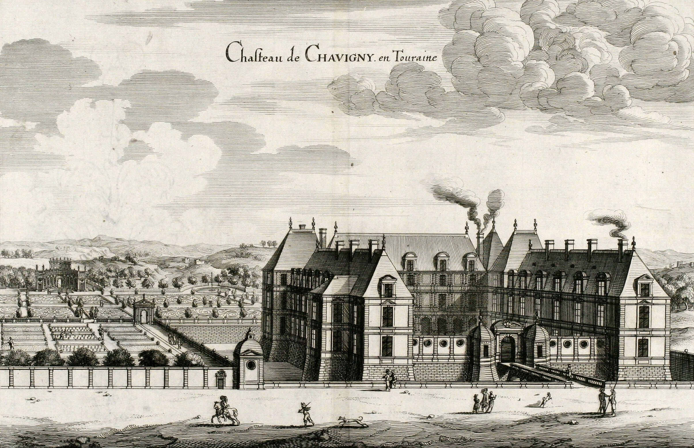 Kupferstich mit der Ansicht des Schlosses Chavigny in Lerné, Frankreich, aus der Topographia Galliae